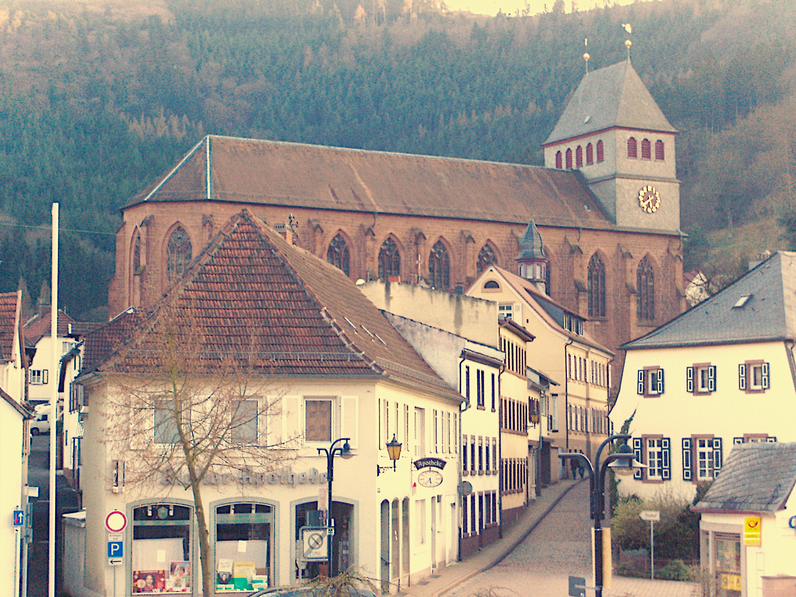 Klosterkirche St. Lambrecht in Lambrecht (Pfalz)